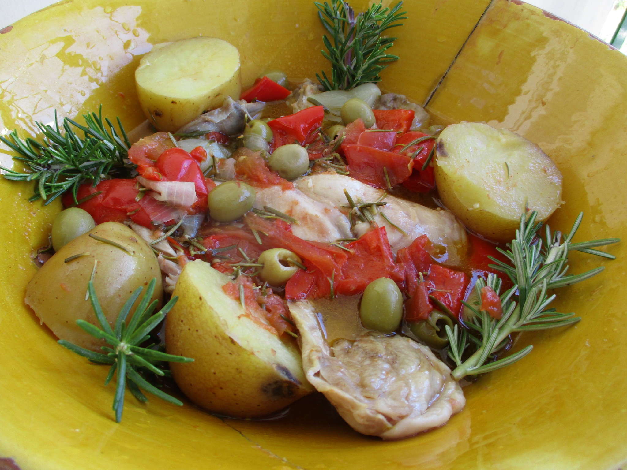 Lapin à la provençale